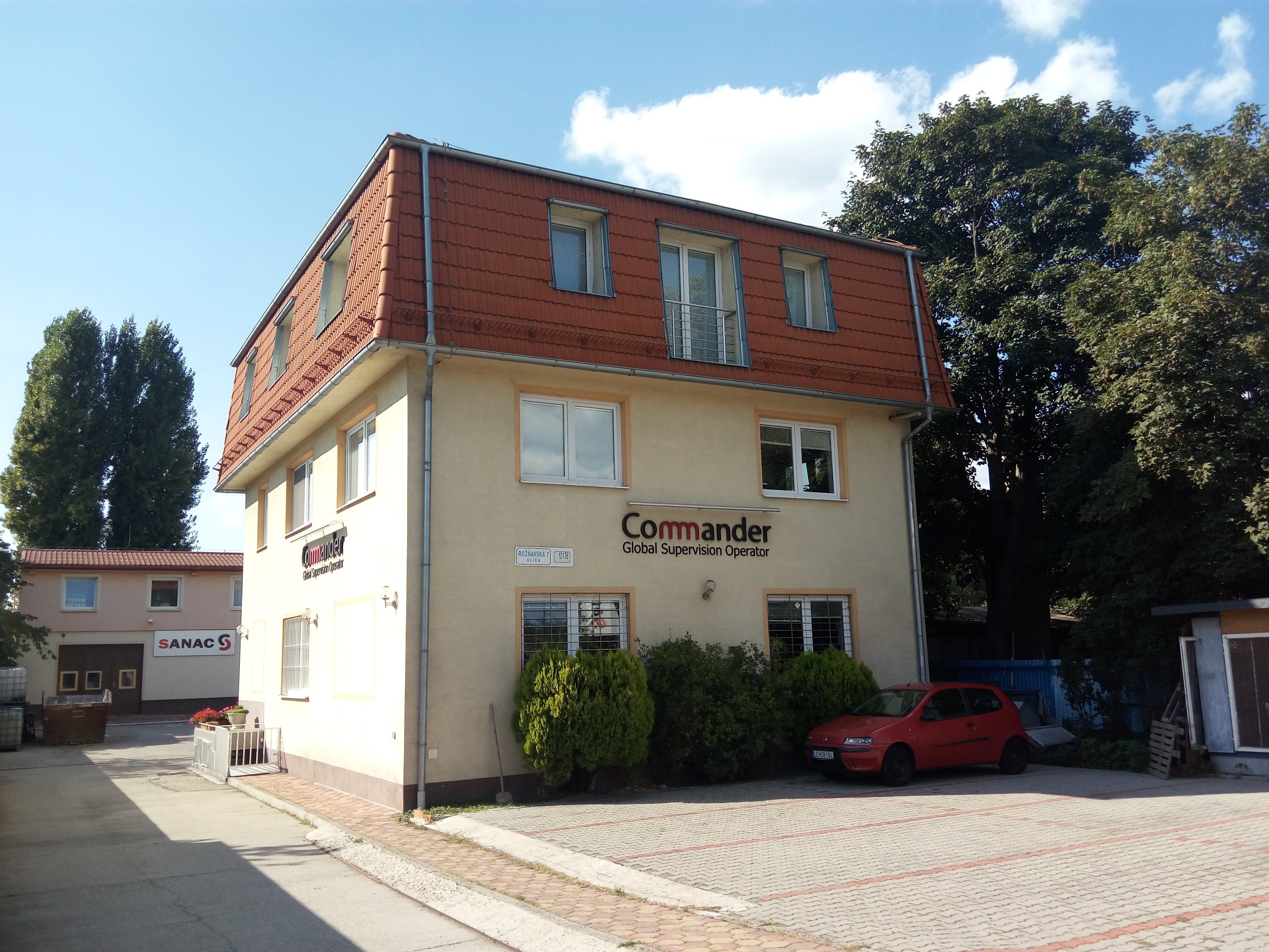 Rožňavská 7, Nové Mesto, Bratislava